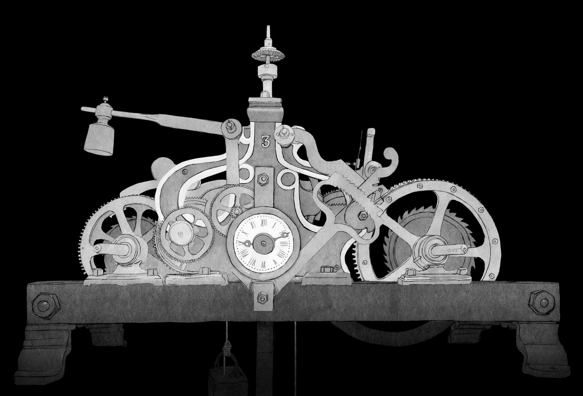 Imatges de l'exposició permanent "La Ciutat Viscuda". Realitzades per Andrés Marín Jarque a partir de 2011, any d'inauguració de l'exposició. Al segle XIX la Diputació de València va finançar la col·locació de rellotges mecànics als campanars de la província de València. Este és un dibuix del model que es trobava a pràcticament tots els campanars de la demarcació.